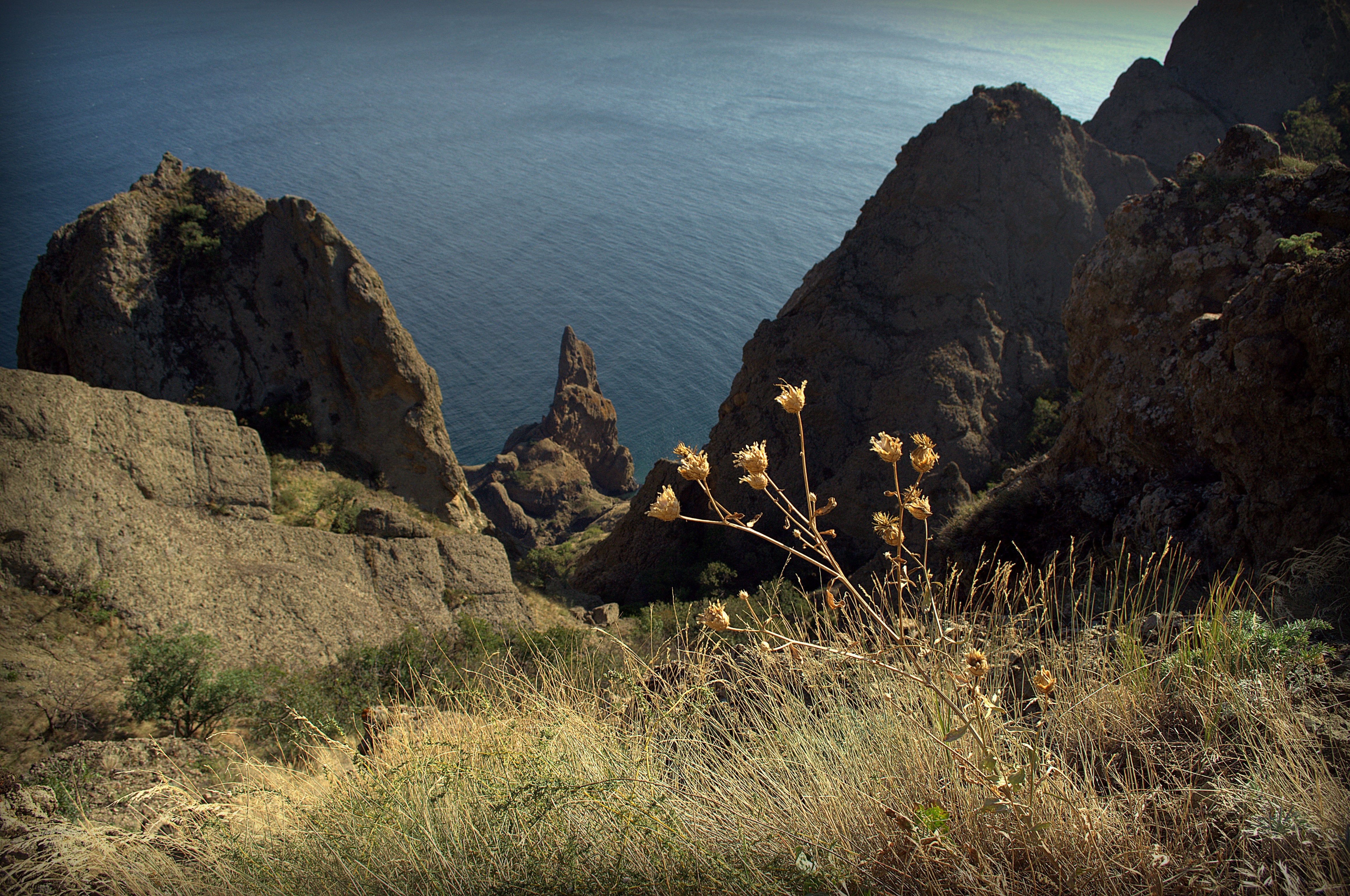 Карадазький ПЗ, 98188 м. Феодосія, сел. Курортне